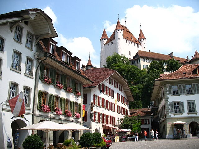 کوردی: شارى ثون..